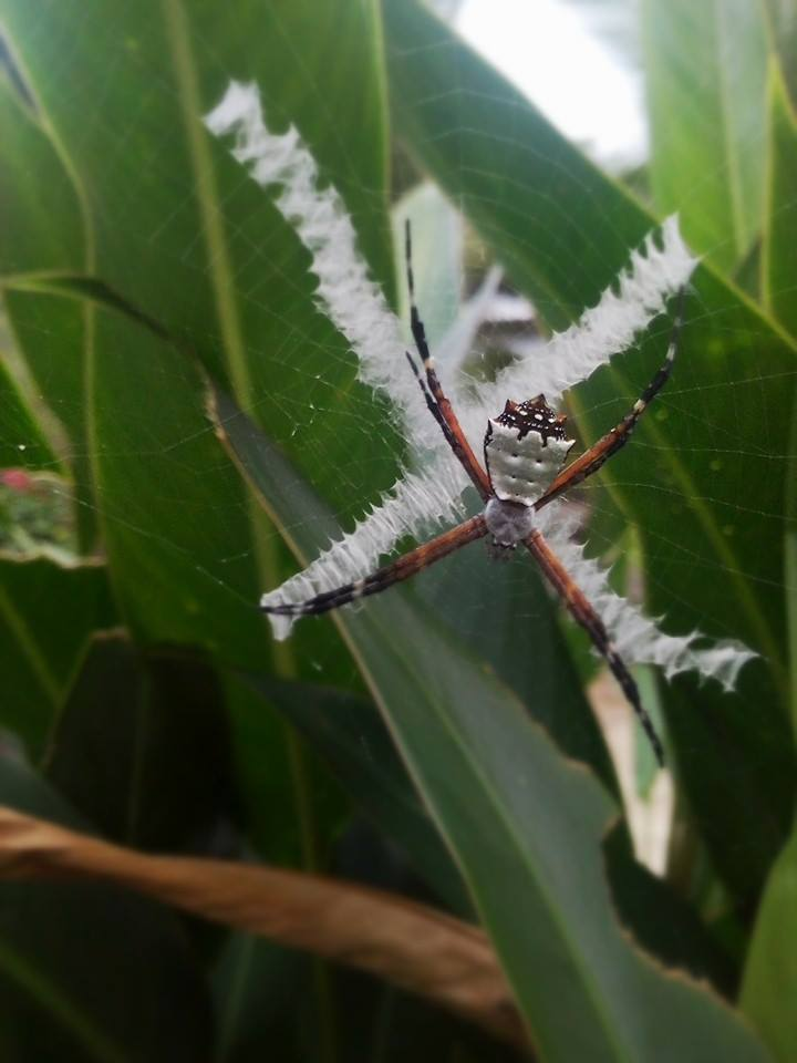 Argiope argentata en el jardin